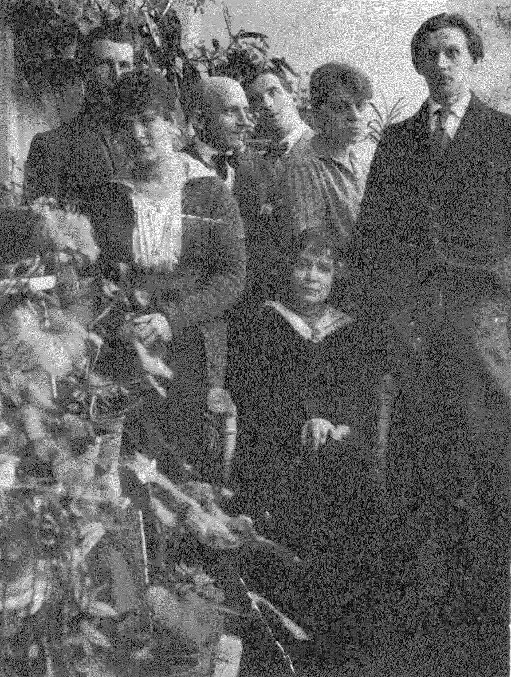 Józef Piotr Mirosław Paszkowski w Zakopanem. Żona Janina P. siedzi w fotelu, obok stoi jej mąż Józef P. W głębi z przechyloną głową stoi młody pisarz Michał Choromański.